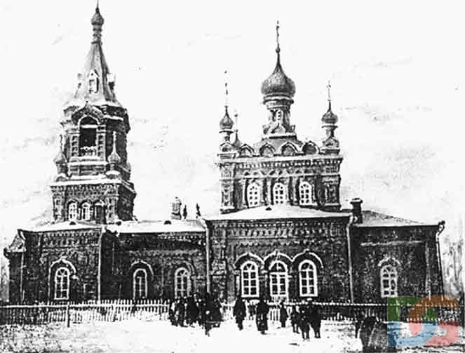 Петропавловский храм в селе Ягул Завьяловского района Удмуртии России в 1915-1930 годах.